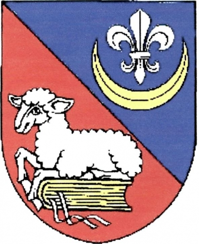 znak,Skorotice , okres Žďár nad Sázavou